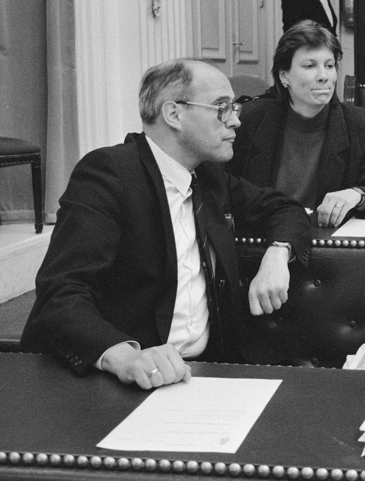 Koos van den Berg (SGP) en Andrée van Es (PSP) in de Tweede Kamer, 1989